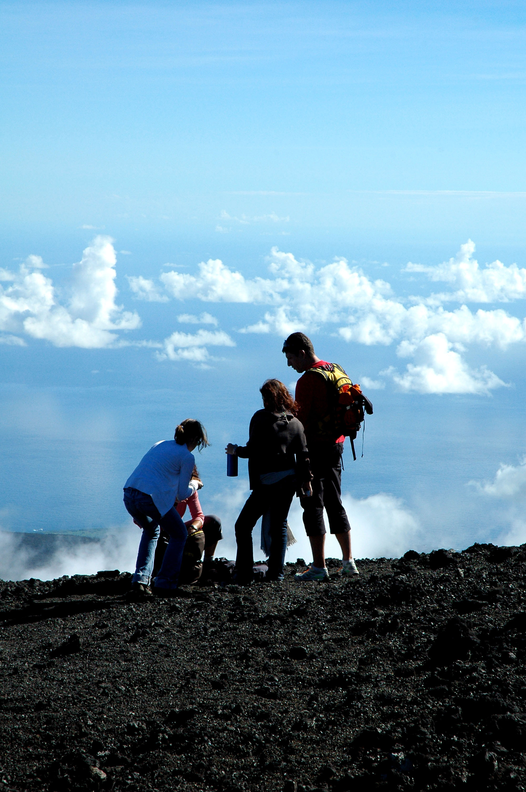 Au dessus du ciel (Piton de la Fournaise, Ile de la Réunion)